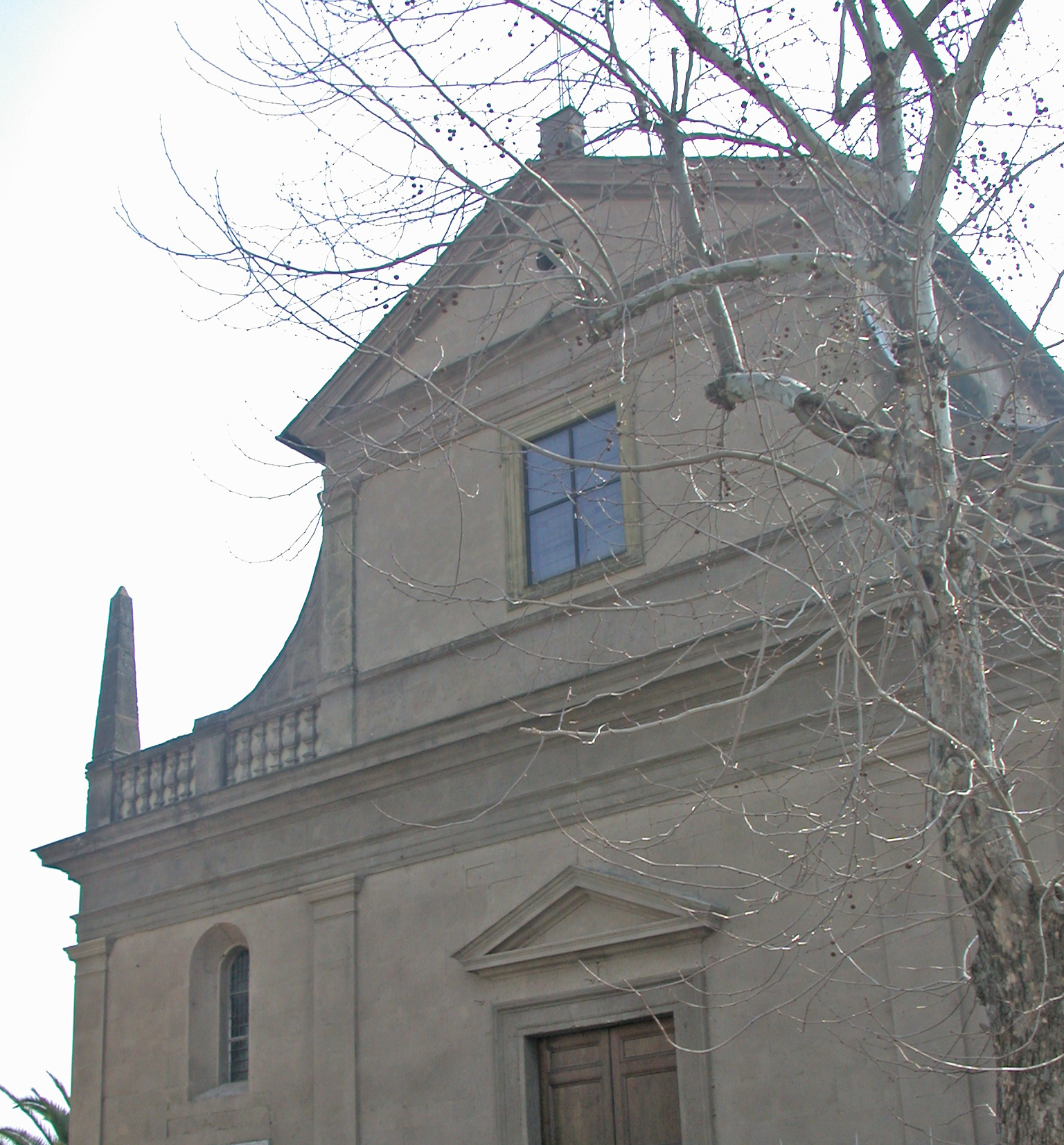 Italia, Regione Lazio, Provincia di Roma, Sacrofano, chiesa di San Biagio, particolare della facciata.